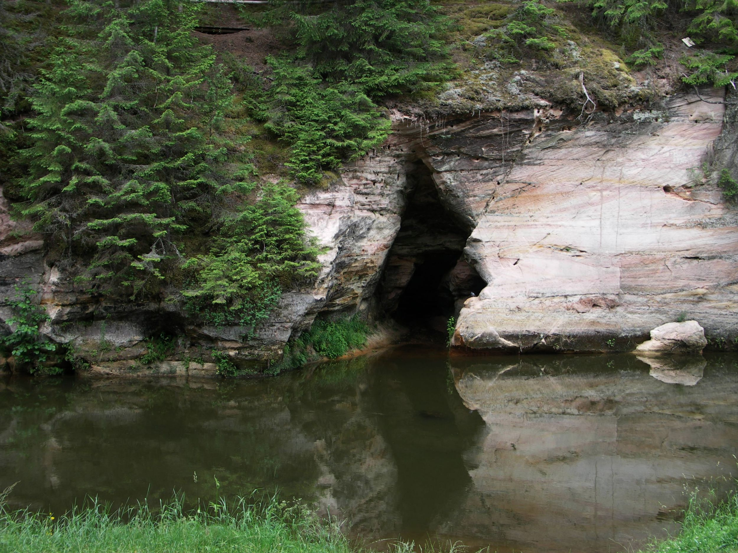 Taevaskoda asub Ahja jõe ürgorus Põlvamaal.